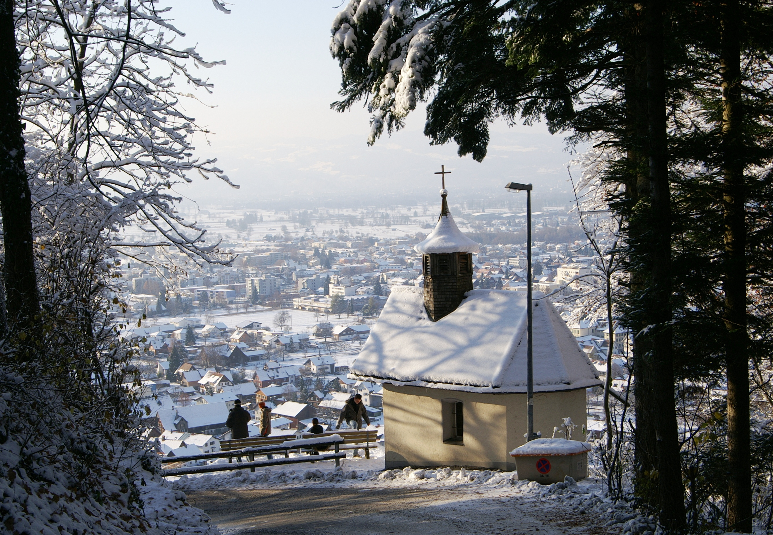 aus dem DEHIO Vorarlberg 1983: KAPELLE, in Bürgle. Erbaut 1880. Rechteckbau mit 5/8-Chor. Satteldach, 6eckiger Dachreiter mit Spitzhelm. Betraum mit Stichkappentonnengewölbe. *** Im Hatlerdorf, Dornbirn.